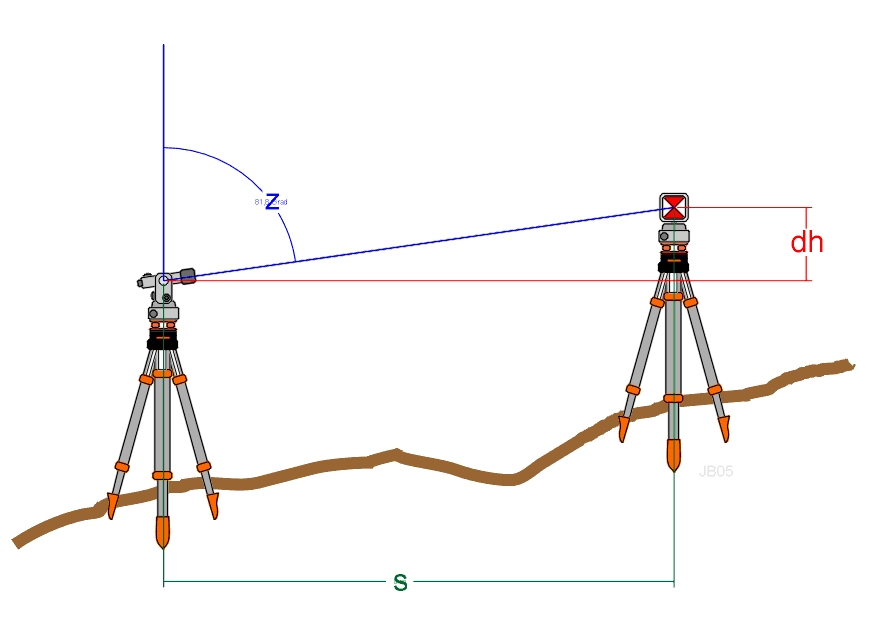 Prinzip der Messung beim triginometrischen Nivellement